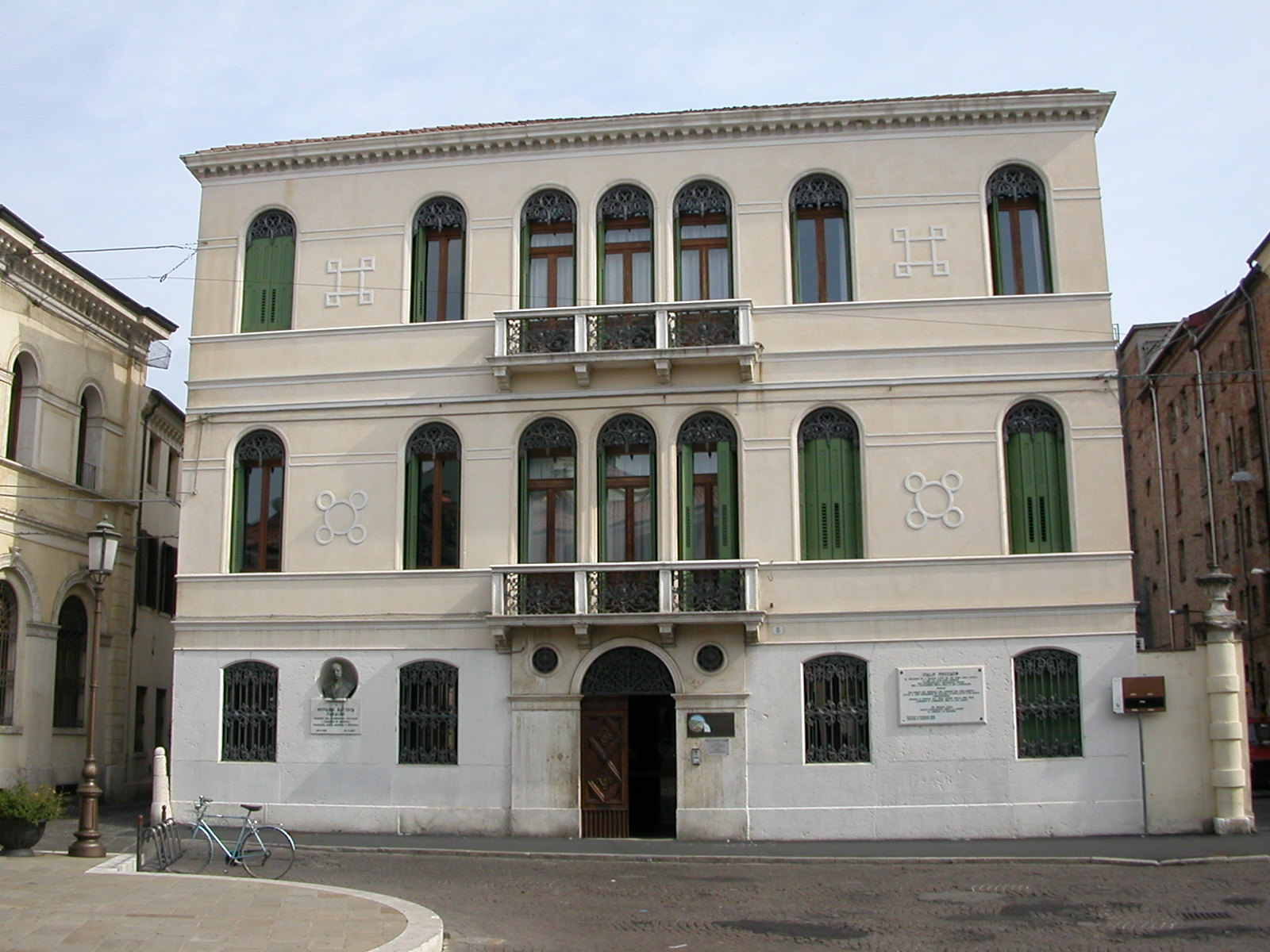 Palazzo Ravenna, ora sede del Consorzio di Bonifica Polesine Adige-Canalbianco, sito in Piazza Garibaldi, Rovigo.